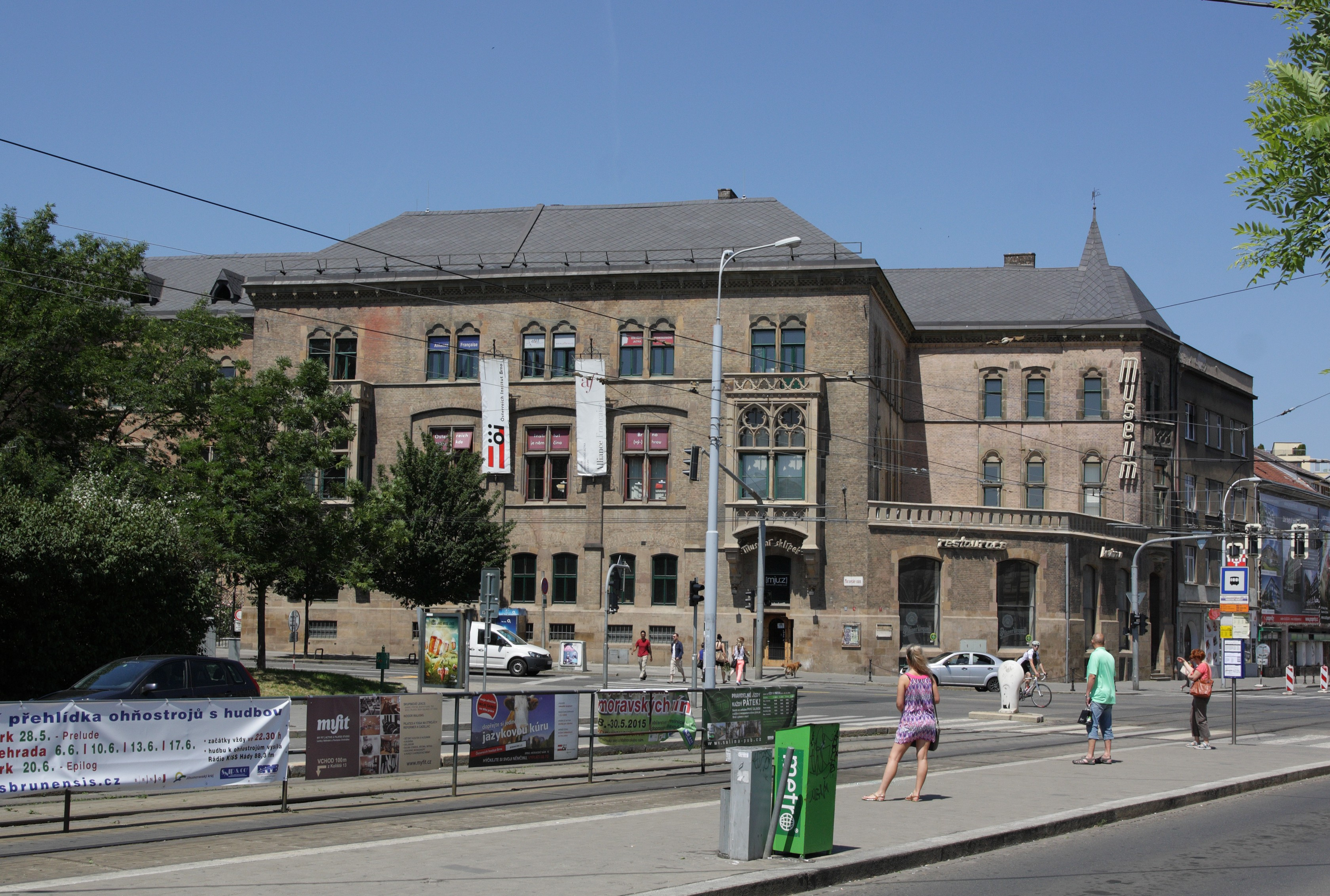 Brno - Malinovského náměstí, Berglův palác.